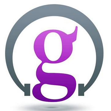 شعار رسمي